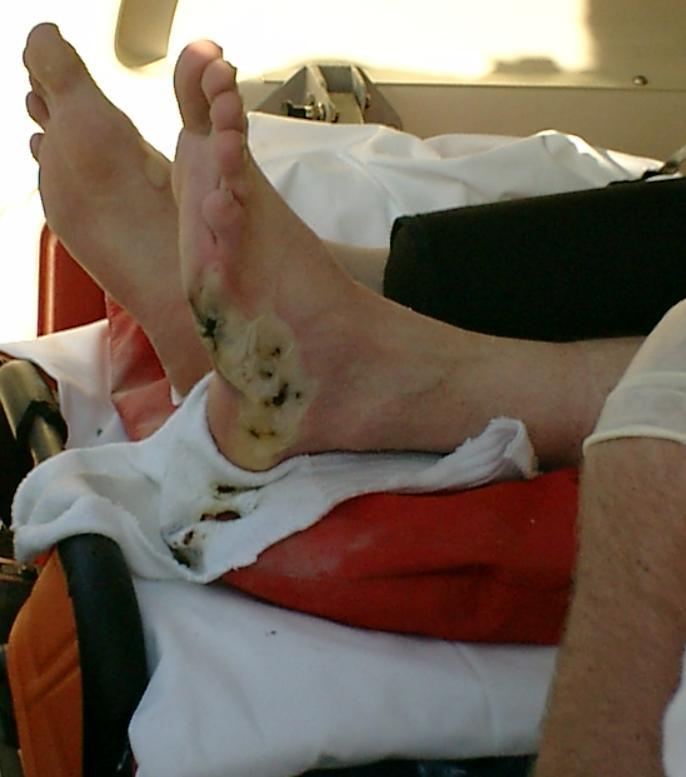 Eine Verbrennung des Grades 2b nach einem Unfall mit einer Hochspannungsleitung.